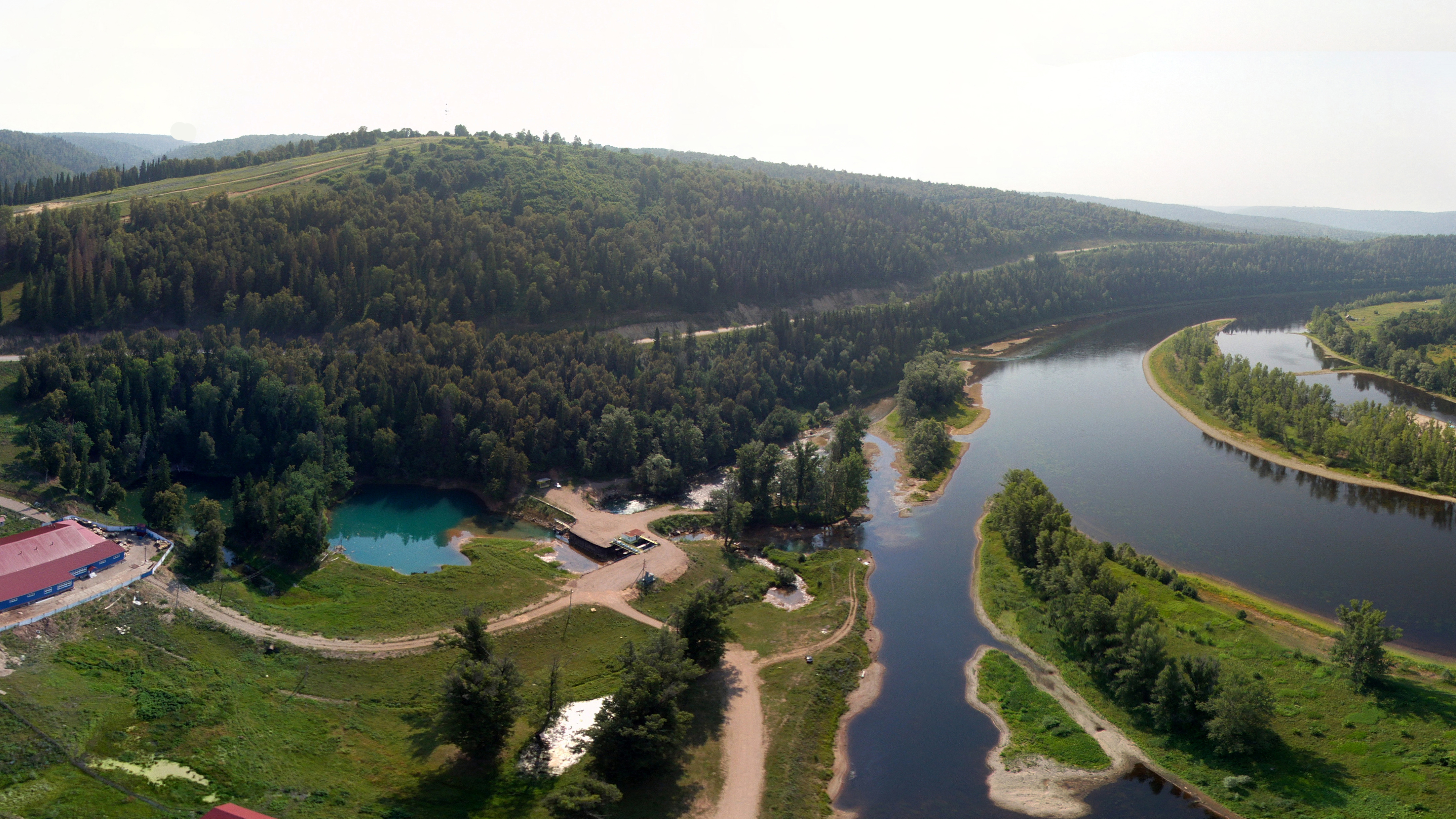 Источник "Красный Ключ", Нуримановский район This image is related to the protected area of Russia number 0210189